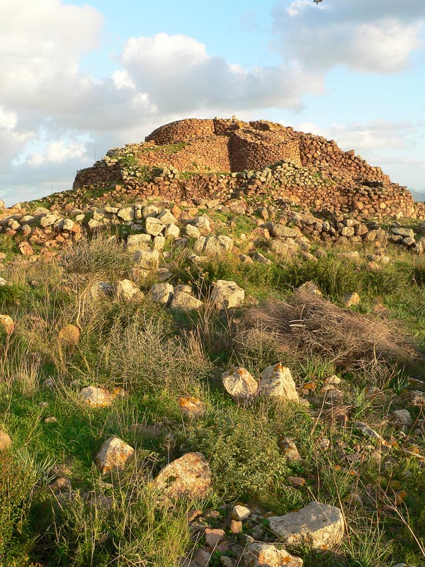 Gonnesa. Nuraghe Seruci